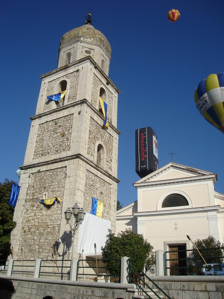 Mongolfiere in volo sullla chiesa dei SS. Nicola e Rocco, Fragneto Monforte (BN)